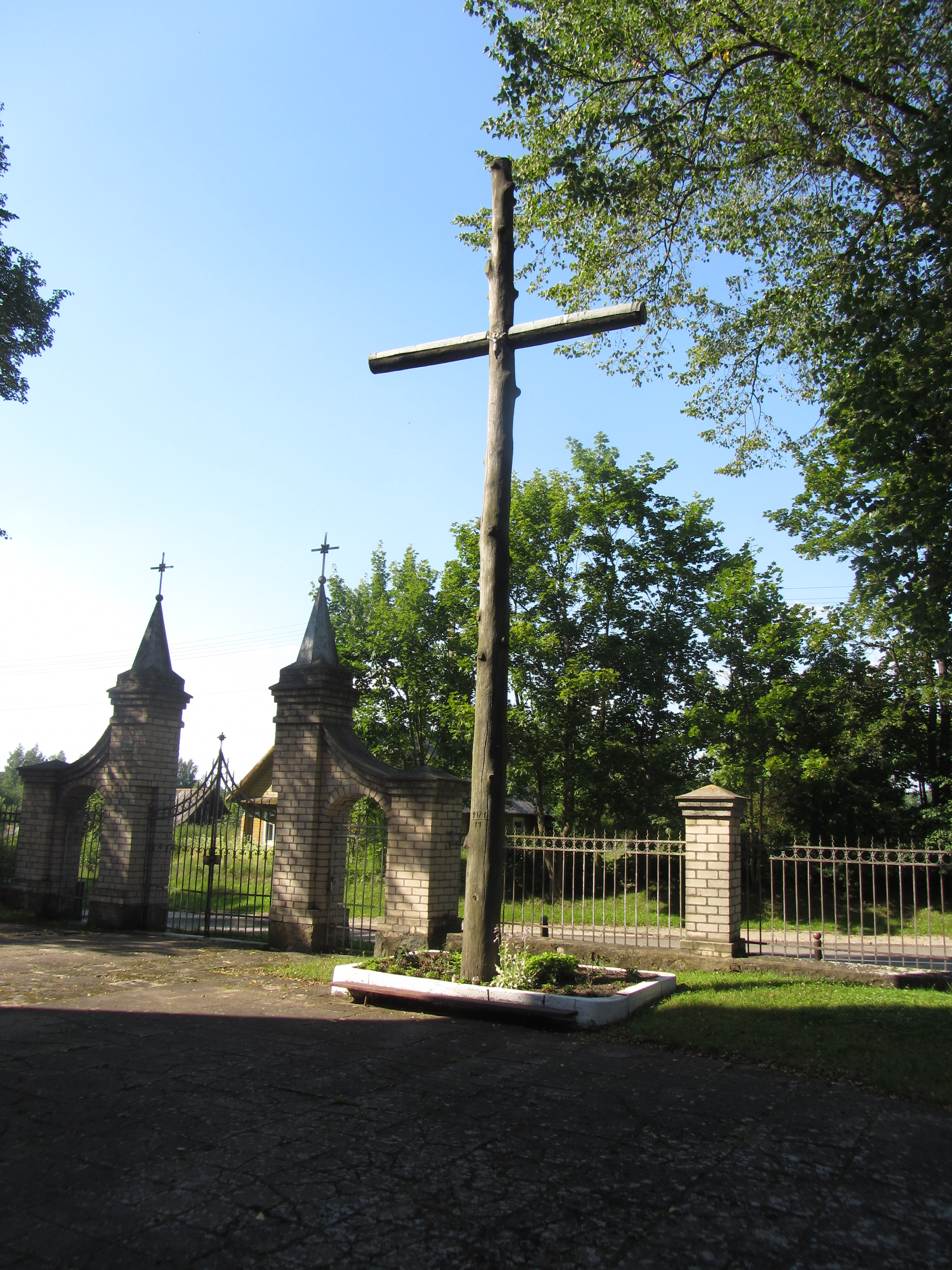 Adutiškis, Lithuania